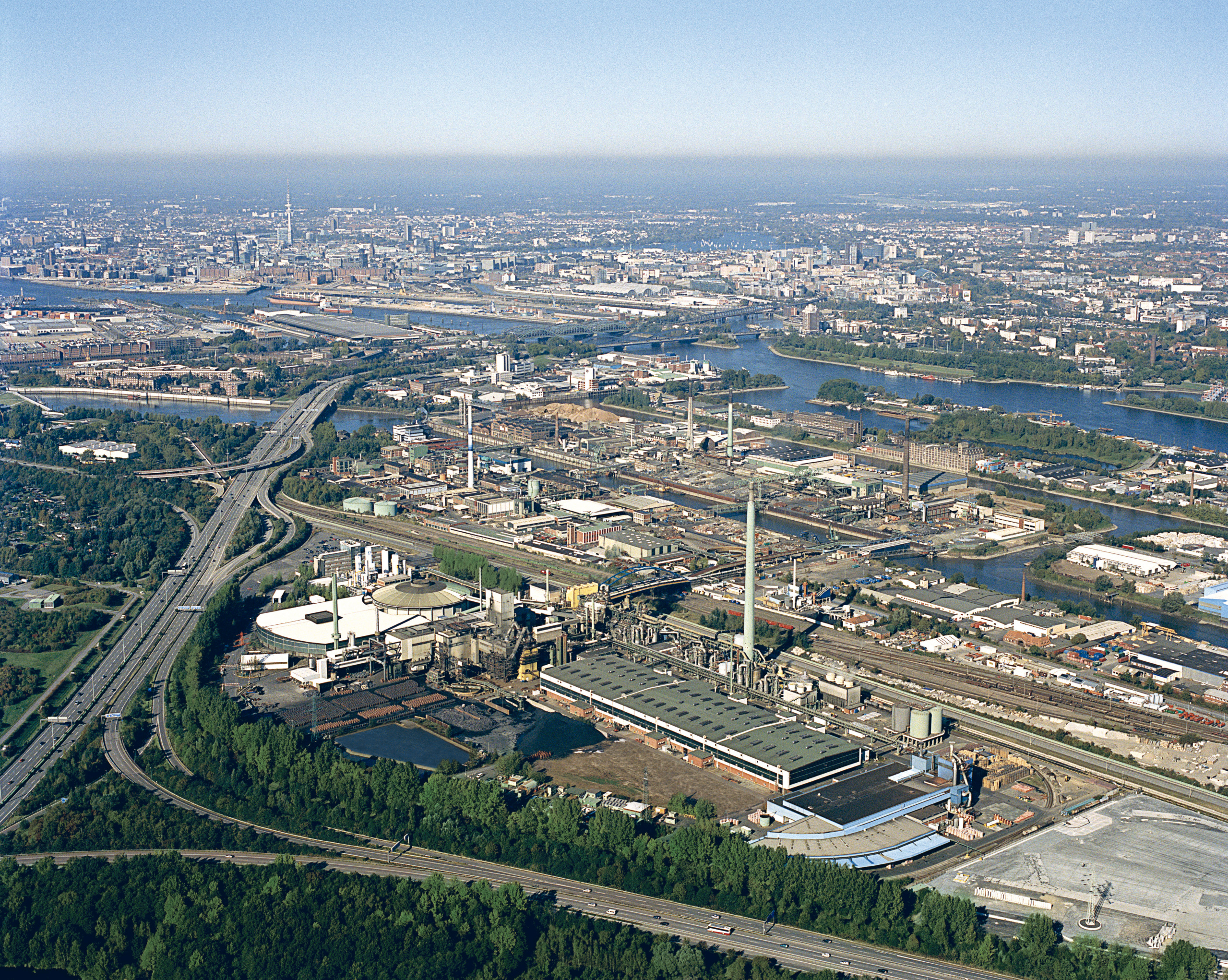 Luftbildaufnahme Aurubis-Werk Hamburg 2007